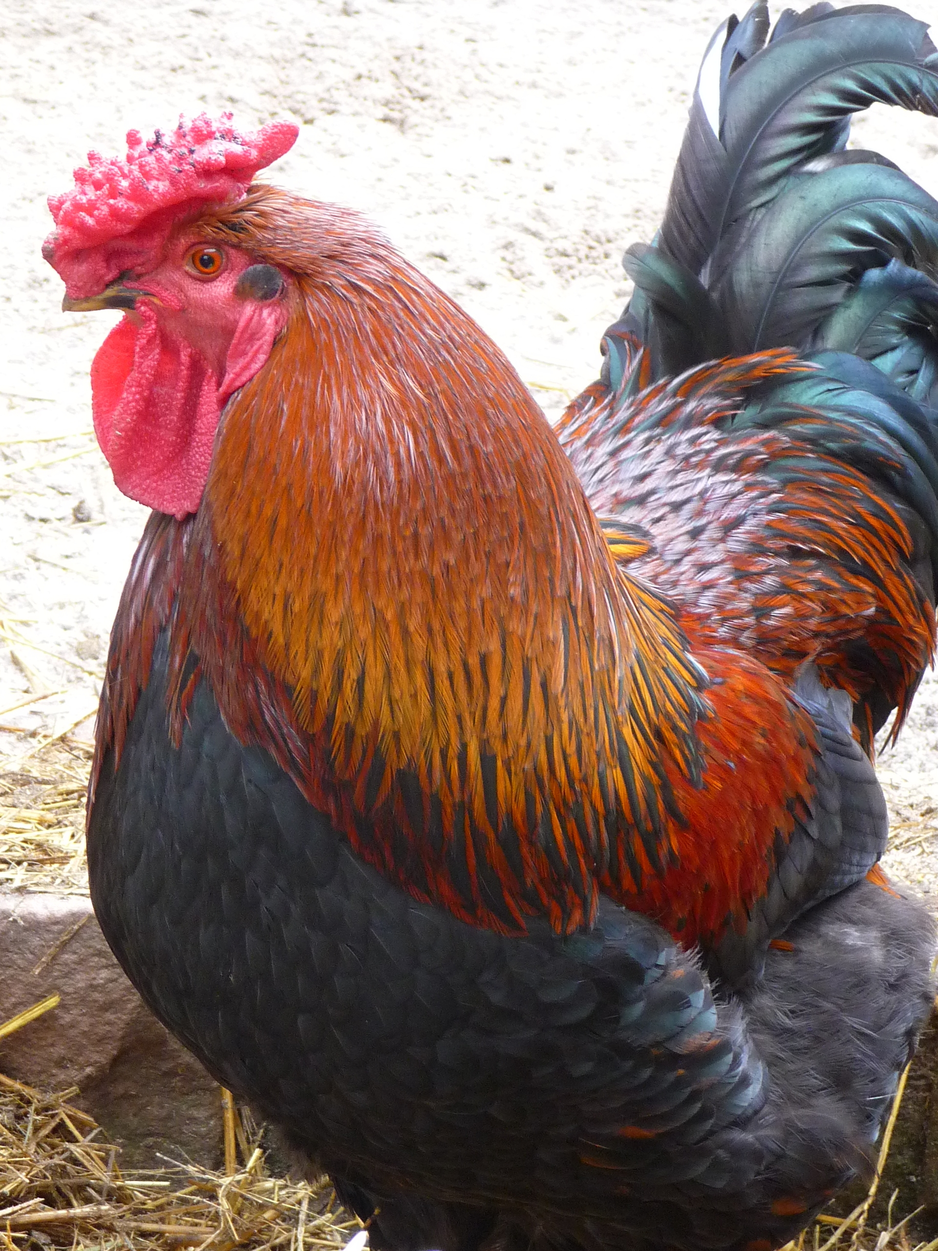 Männliches Haushuhn (Gallus gallus domesticus)